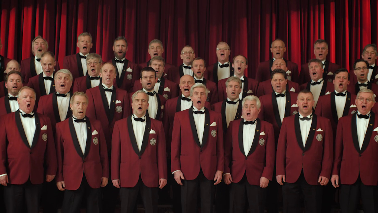 Skjáskot úr Hraustir menn – kynningarmyndbandi fyrir Mottumars 2014.